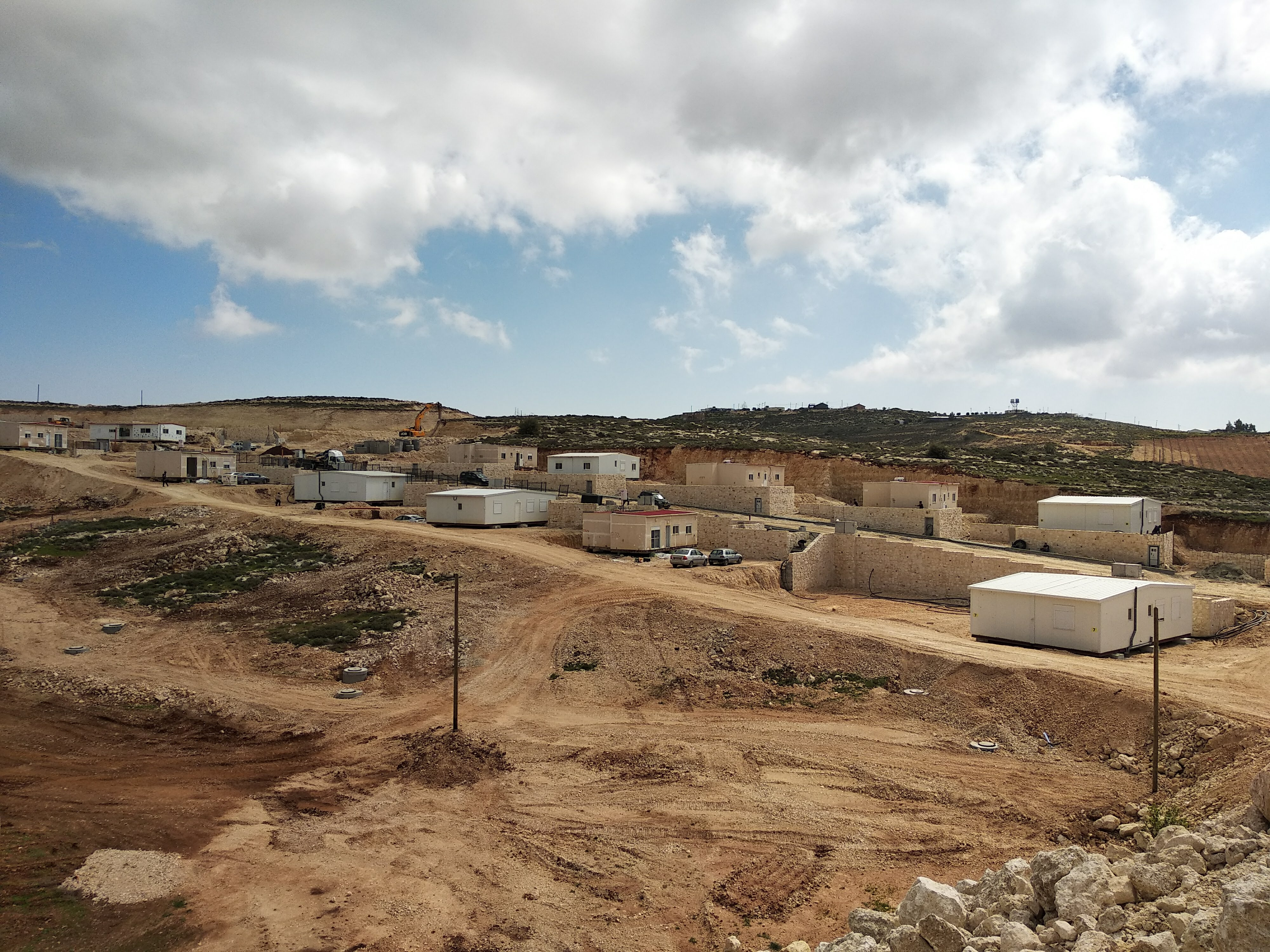 מבט על חלקו הדרומי של היישוב עמיחי, כפי שצולם ב-11/3/18, בסיום מבצע הנחת הקראווילות